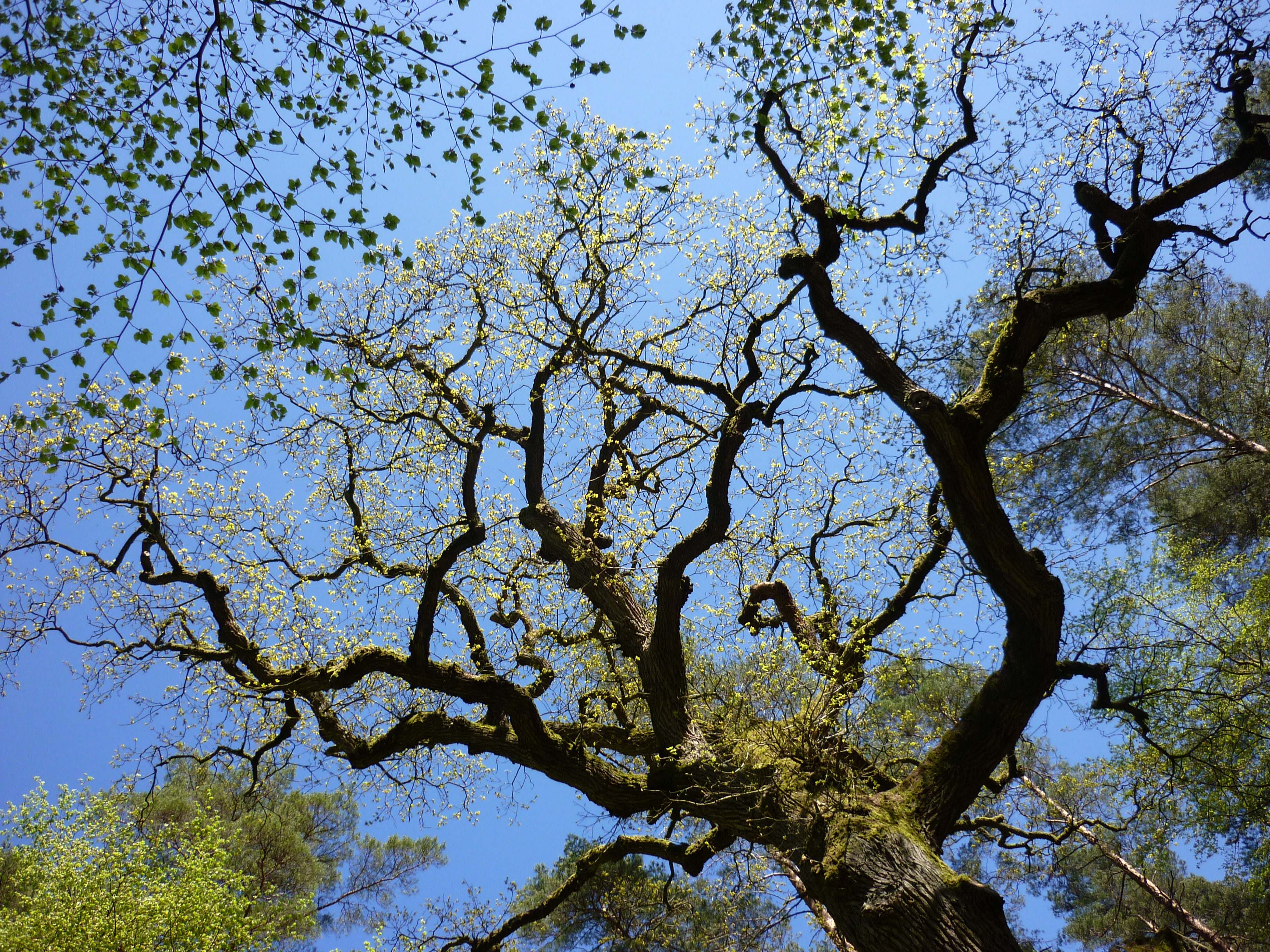 Blick in die Baumkrone der Schwedeneiche bei Himmelpfort (Fürstenberg/Havel, Brandenburg)